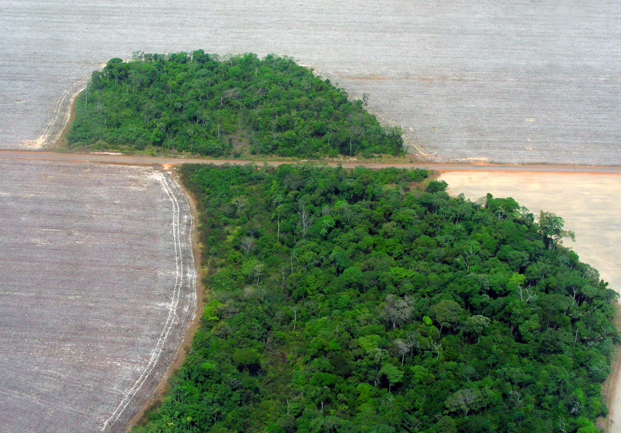 Mato Grosso – Trecho de mata em área de plantio de algodão no noroeste do estado, próximo à região do Parque Indígena do Xingu